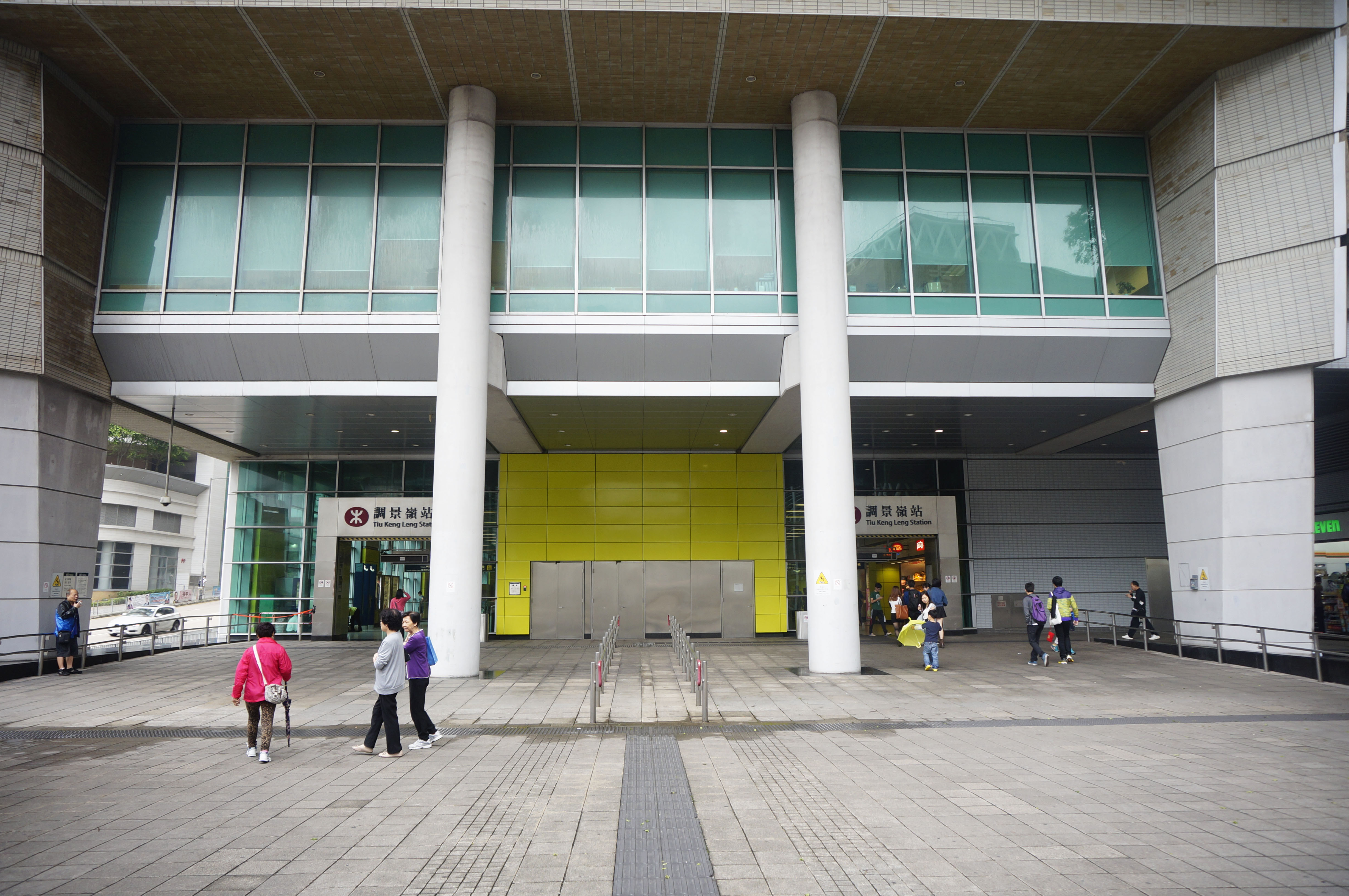 港鐵調景嶺站A出入口